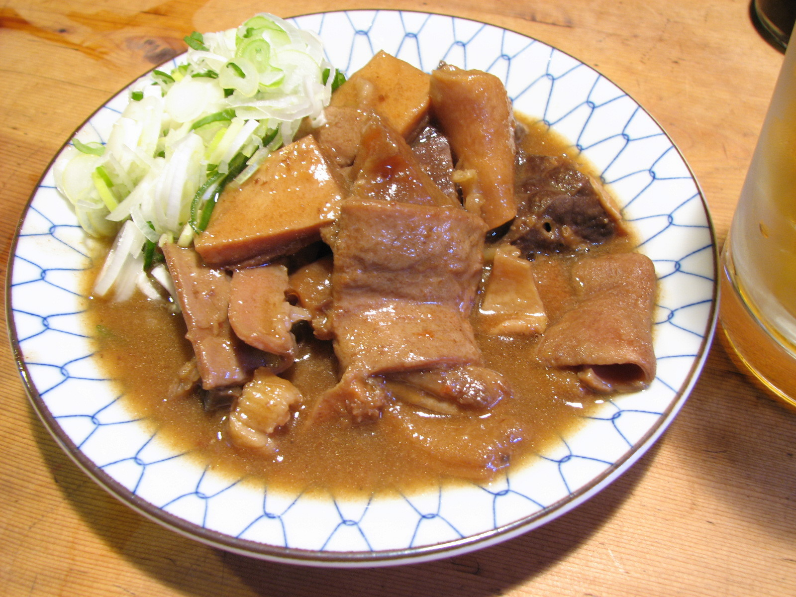 Nikomi, the tripe stew(東京・岸田屋の煮込み)